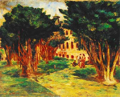 李梅樹作品：台北醫院之庭園，1929，油彩 畫布，72.5×91cm。